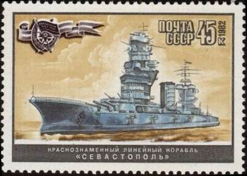 Марка СССР PD-RU-exempt